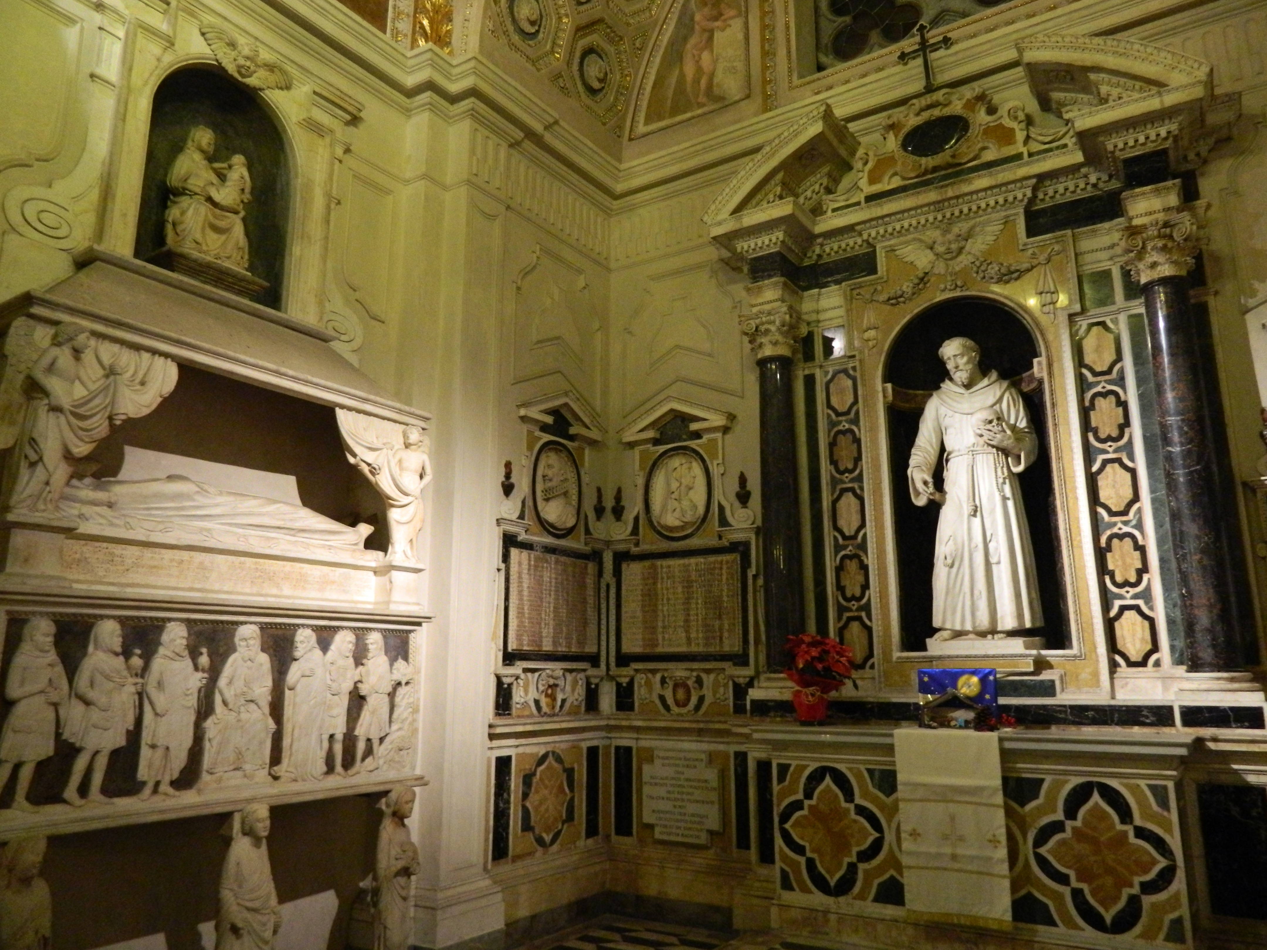 Cappella di San Francesco d'Assisi (Basilica di Santa Chiara, Napoli). Cappella superstite dal bombardamento del 1943, Santa Chiara